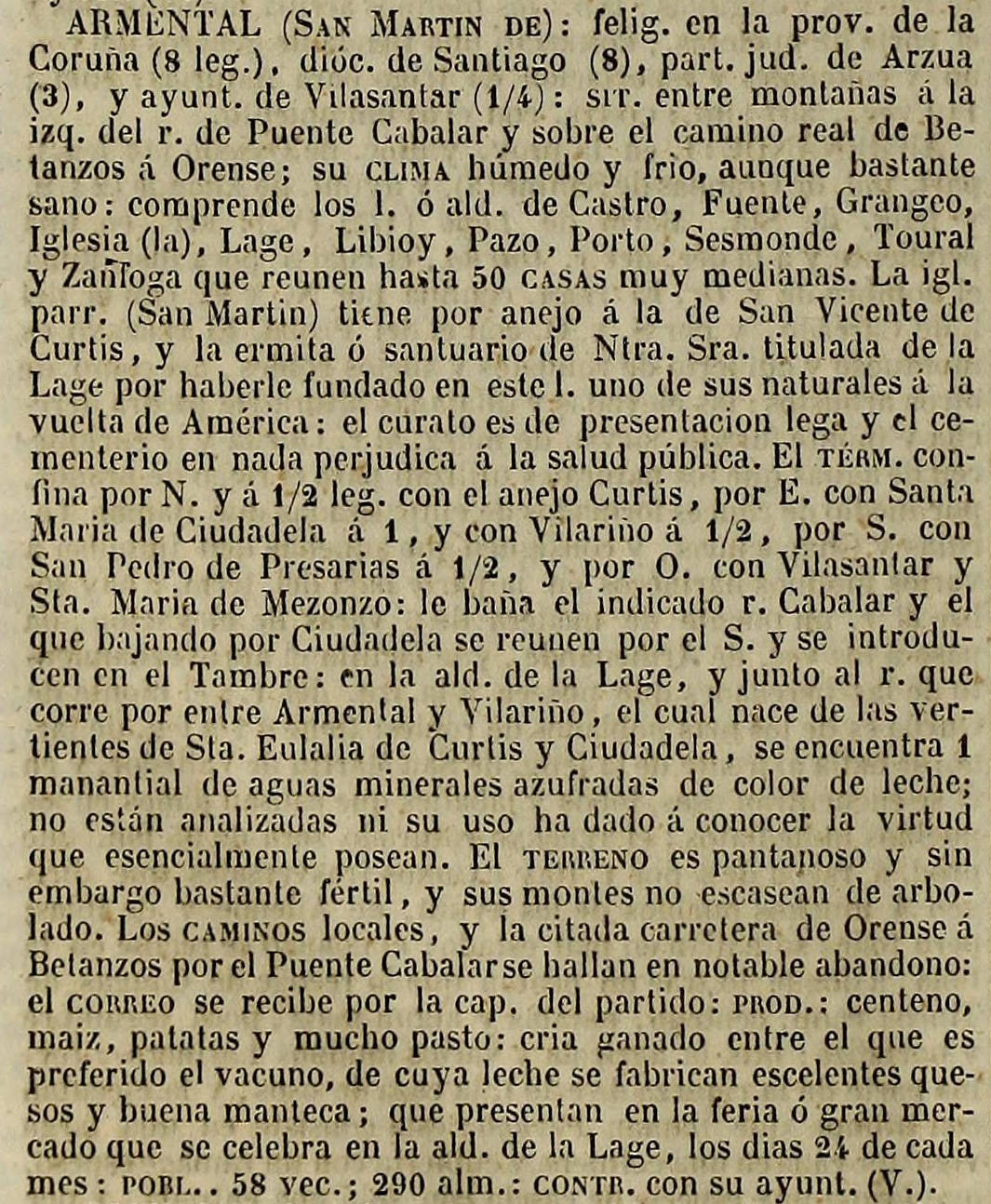 Armental no Diccionario geográfico-estadístico-histórico de España y sus posesiones de Ultramar.